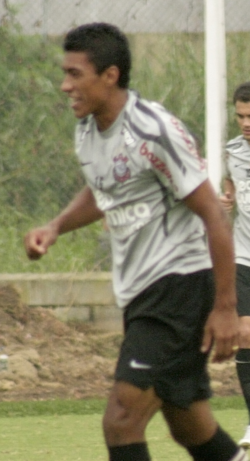 Paulinho, jogador do Corinthians durante o treinamento em Itaquera